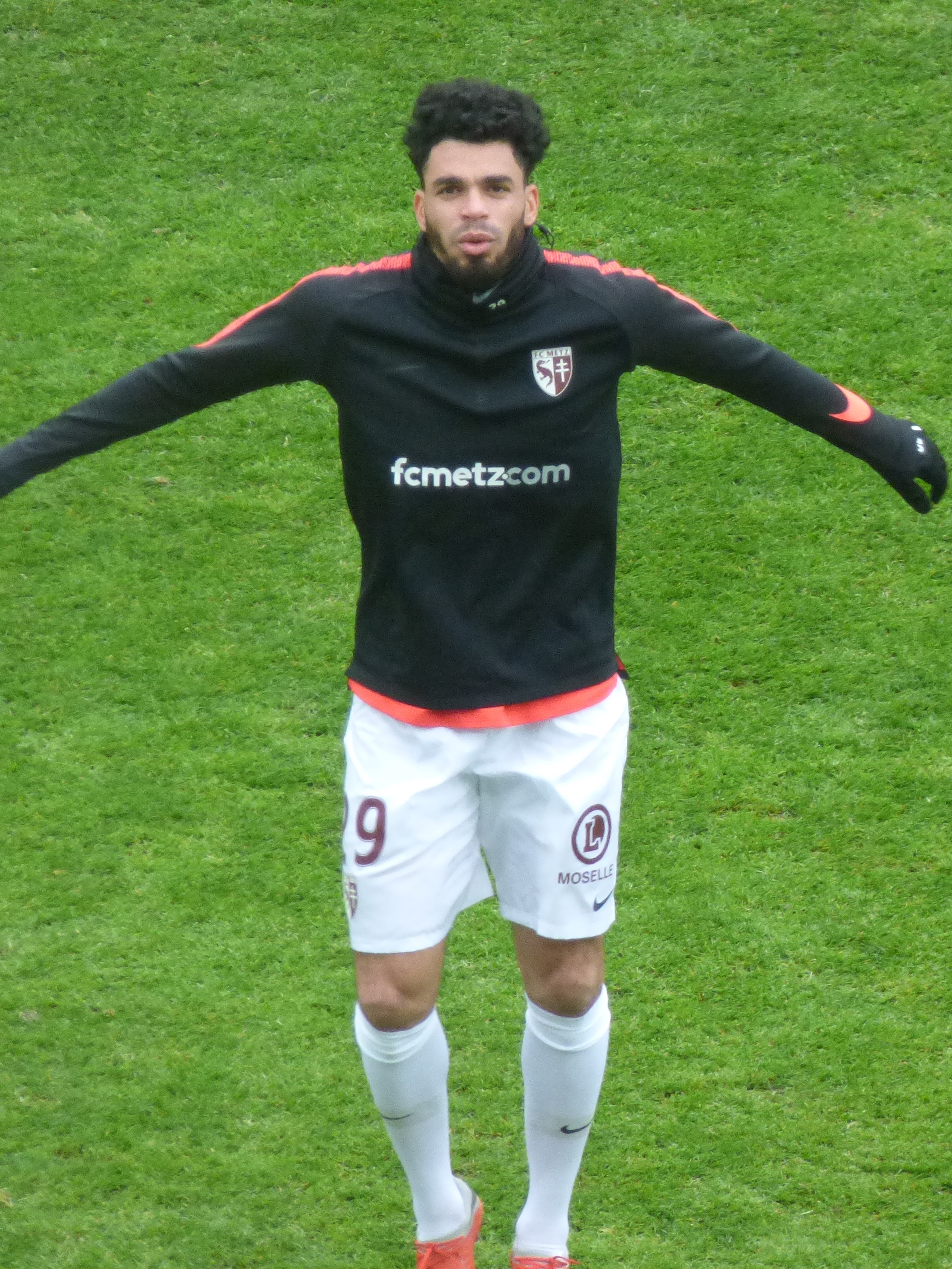 Emmanuel Rivière avant le match RC Lens / FC Metz, comptant pour la vingt-quatrième journée du championnat de France de Ligue 2 2018-2019, le 9 février 2019, au Stade Bollaert-Delelis.